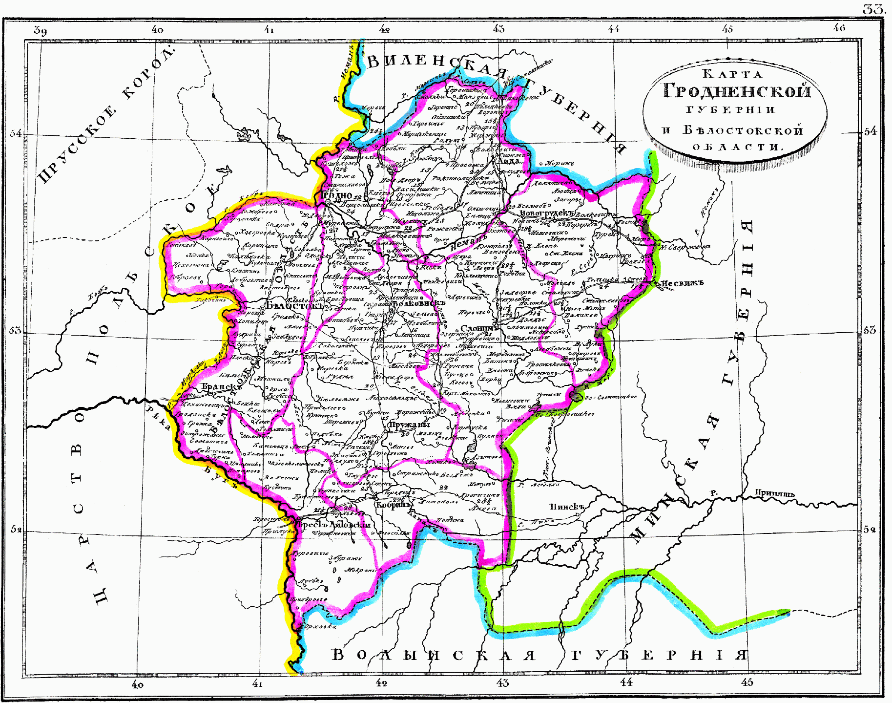 Карта Гродненской губернии, 1835